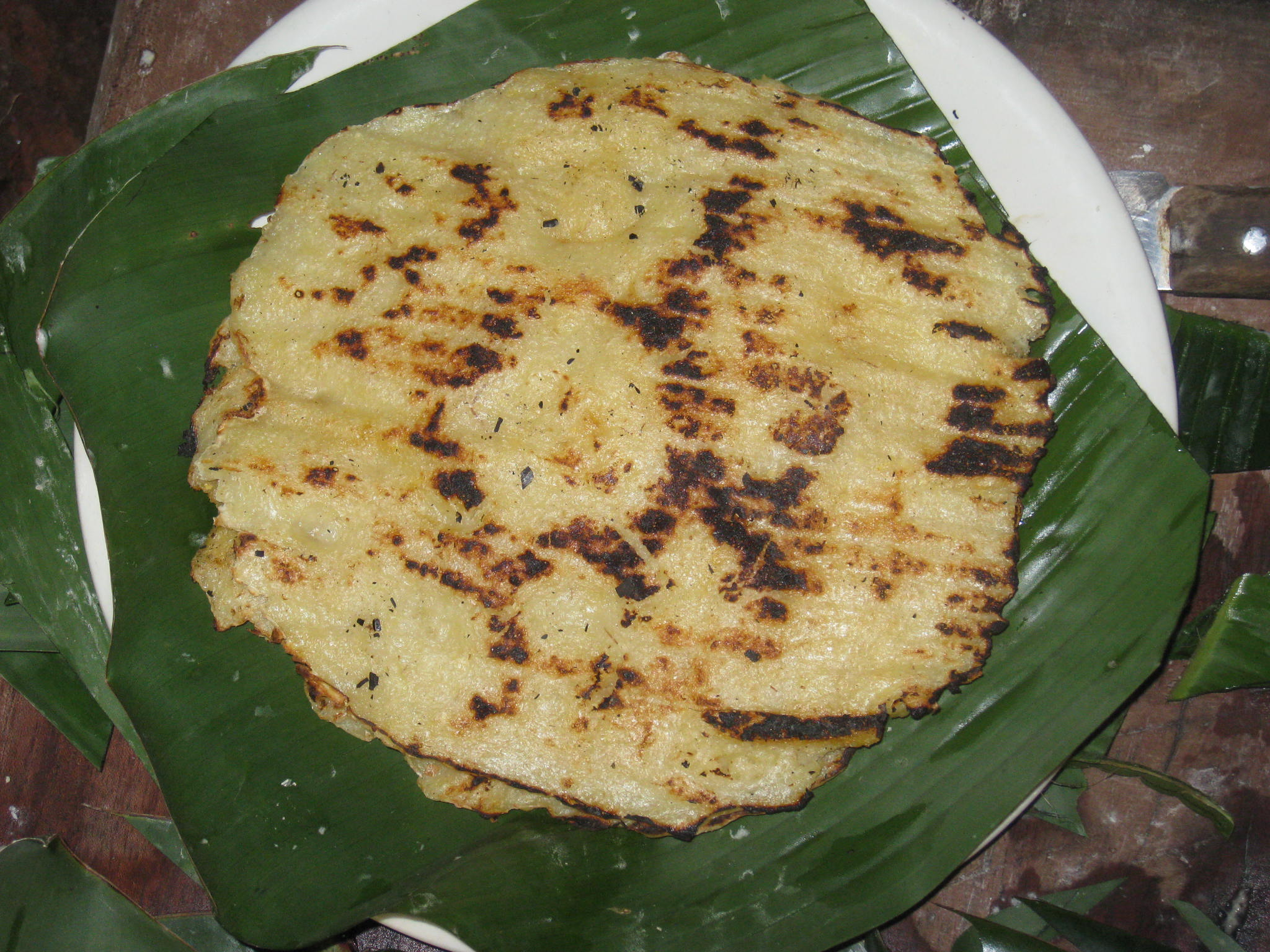 Acabada de cocinar.